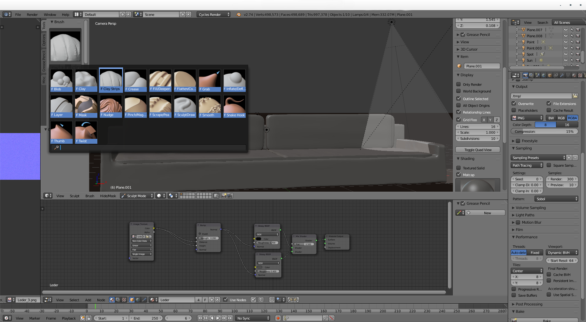 Blender Sculpting-Ansicht Blender Foundation